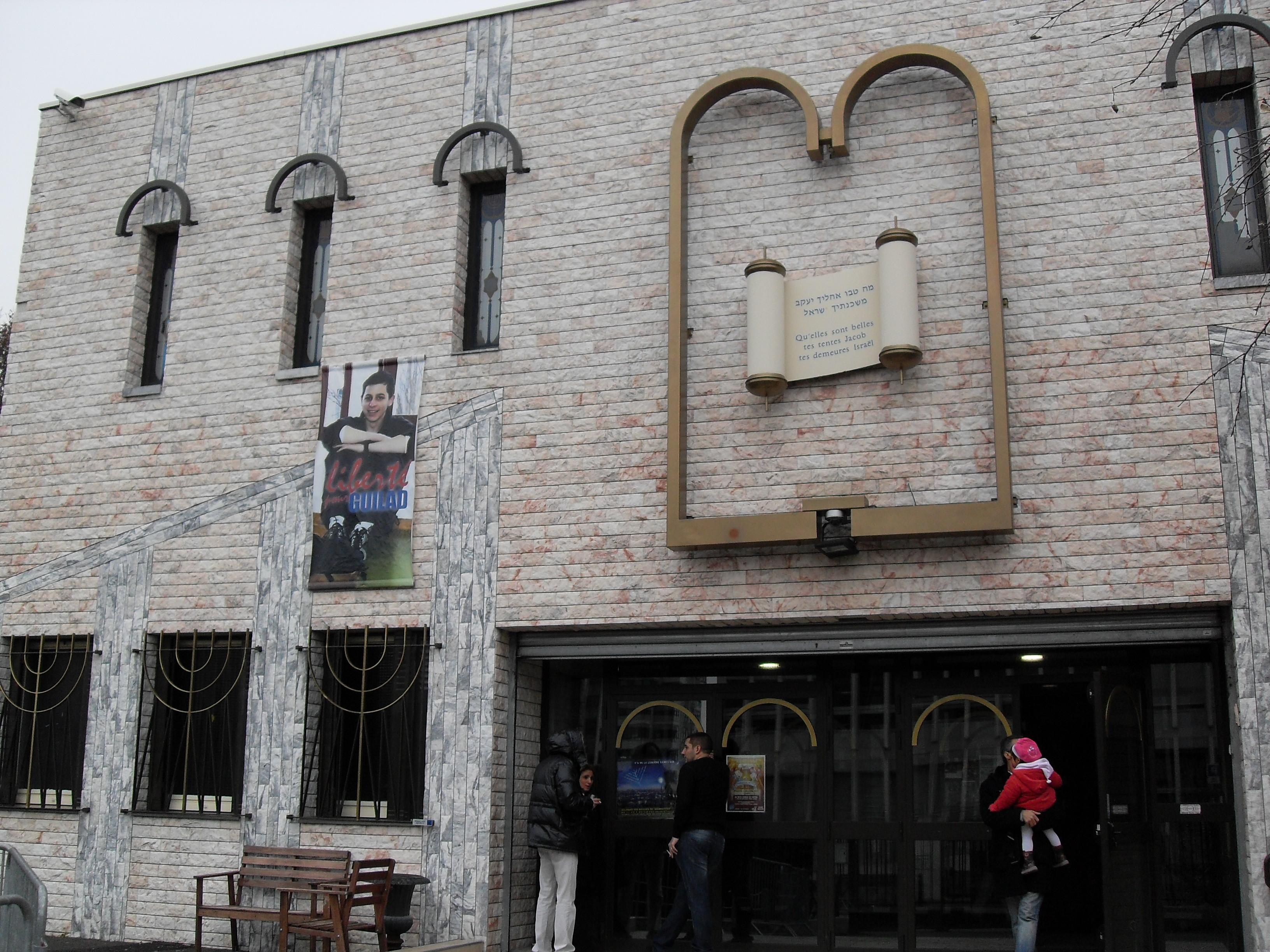 Créteil synagogue Liberté pour Guilad A.C.I.C. Synagogue et Centre Communautaire de Créteil. Rue du 8 mai 1945 94000 CRÉTEIL Sur la façade est déployée une banderole "Liberté pour Guilad". Le verset biblique Nombres 24,5 figure également sur la Synagogue d'Épernay.